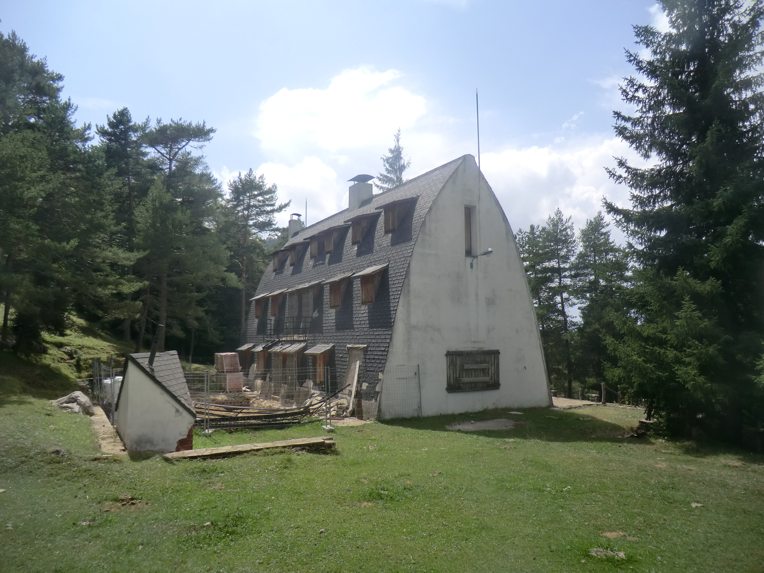 Xalet de Catllaràs, obra d'Antoni Gaudí